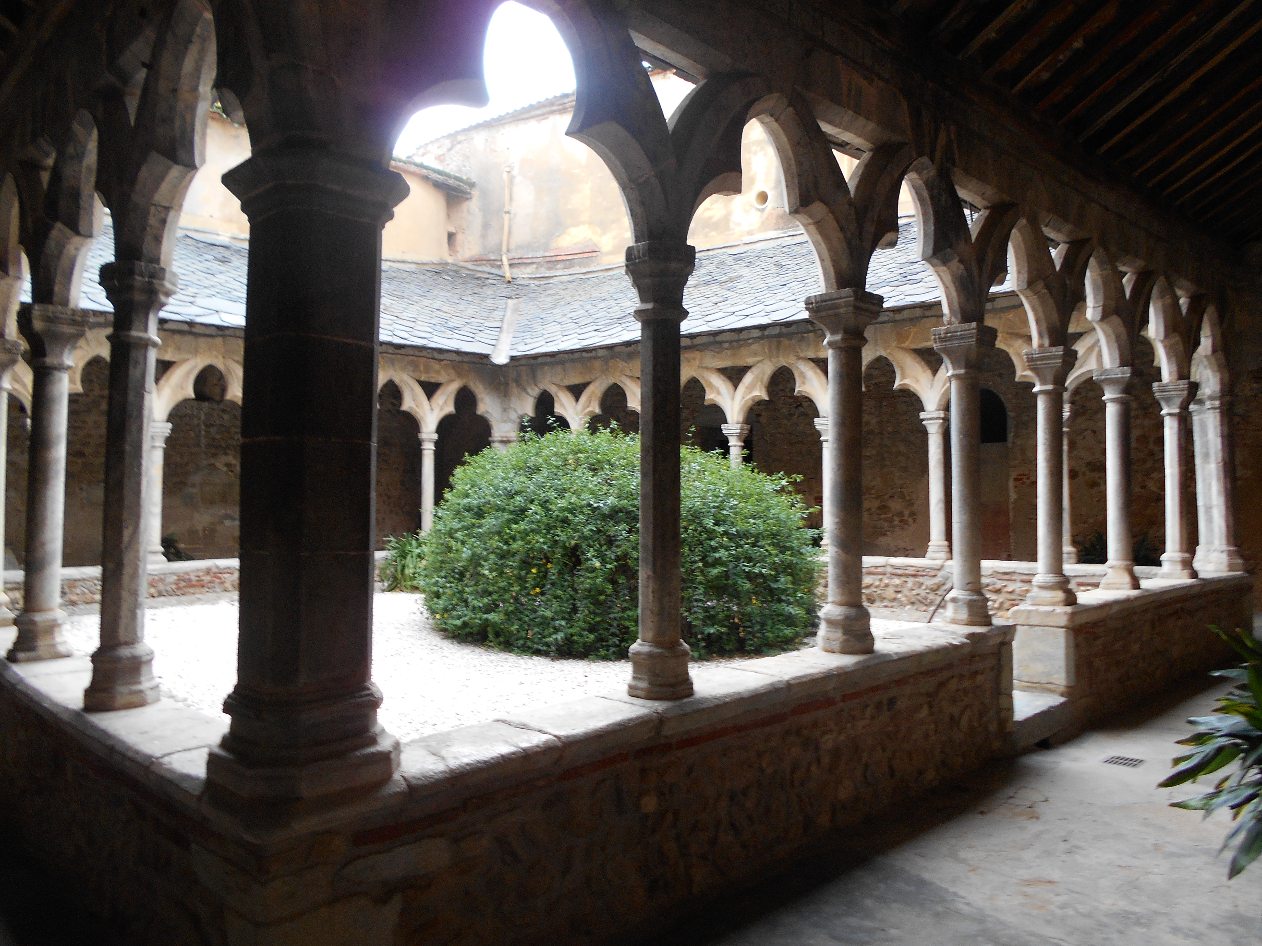 Claustre del Monestir del Camp